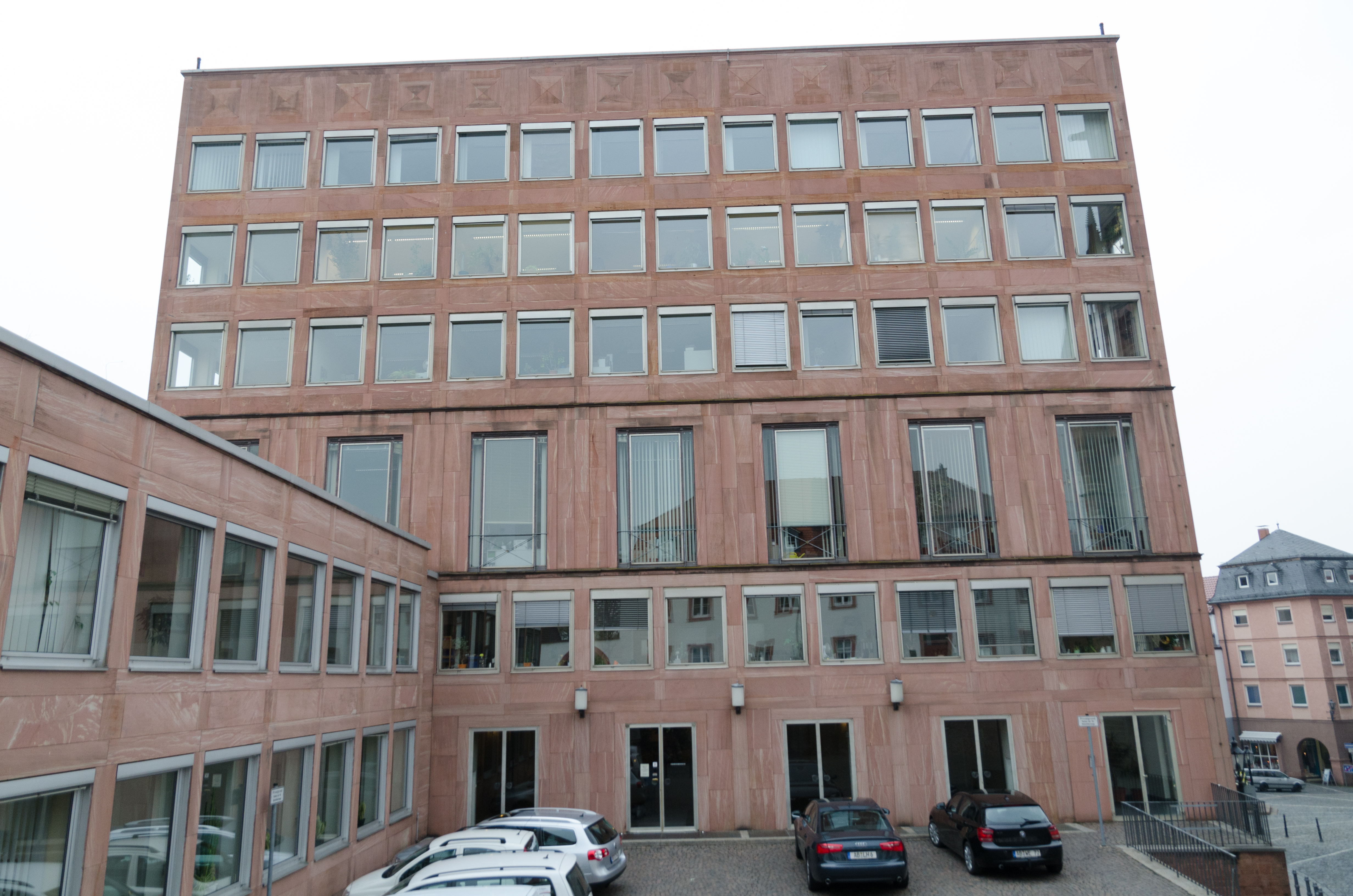 Aschaffenburg, Rathaus, Rückseite